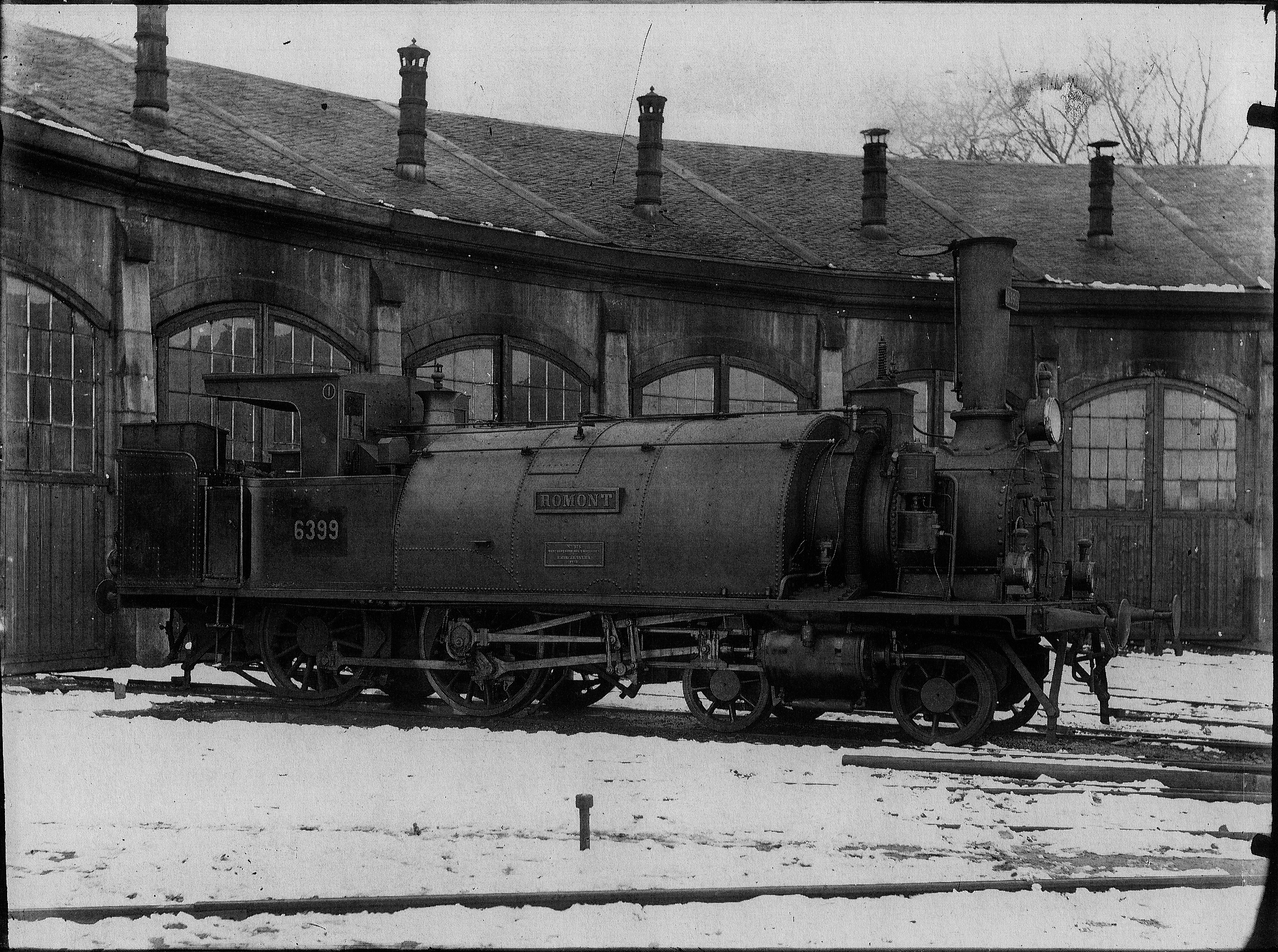 Tender-Locomotive Ec 2/4 Nr. 6399 Romont der Schweizerischen Bundesbahnen mit sattelförmig über den Dampfkessel gelegtem Wasserbehälter, gebaut 1862 in Emil Kesslers Machinen-Fabrik zu Esslingen (Fabr-Nr. 578) für die Lausanne—Freiburg—Bern-Bahn (Betr.-Nr. 4), 1865 von den Chemins de fer de la Suisse Occidentale übernommen (ab 1871 Betr.-Nr. 54), 1881 an die Suisse-Occidentale-Simplon, 1890 bis 1903 B2 Nr. 254 der Jura—Simplon-Bahn, 1905 außer Dienst gestellt und anschließend abgebrochen; aufgnommen im Winter 1903/’04 im Fahrzeug-Dépôt zu Zürich.